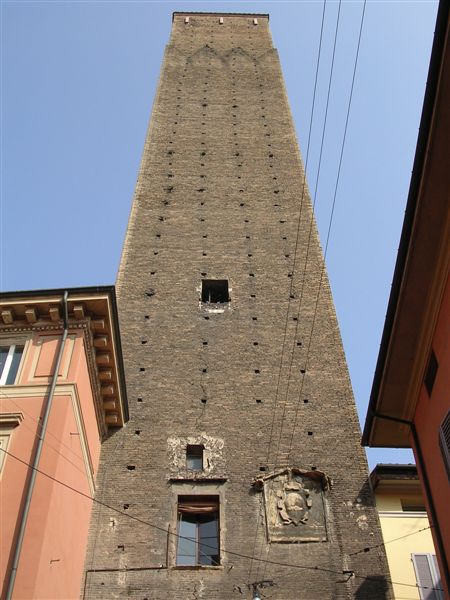 Torre dei Prendiparte in Bologna. Picture by Paolo Carboni (myself)